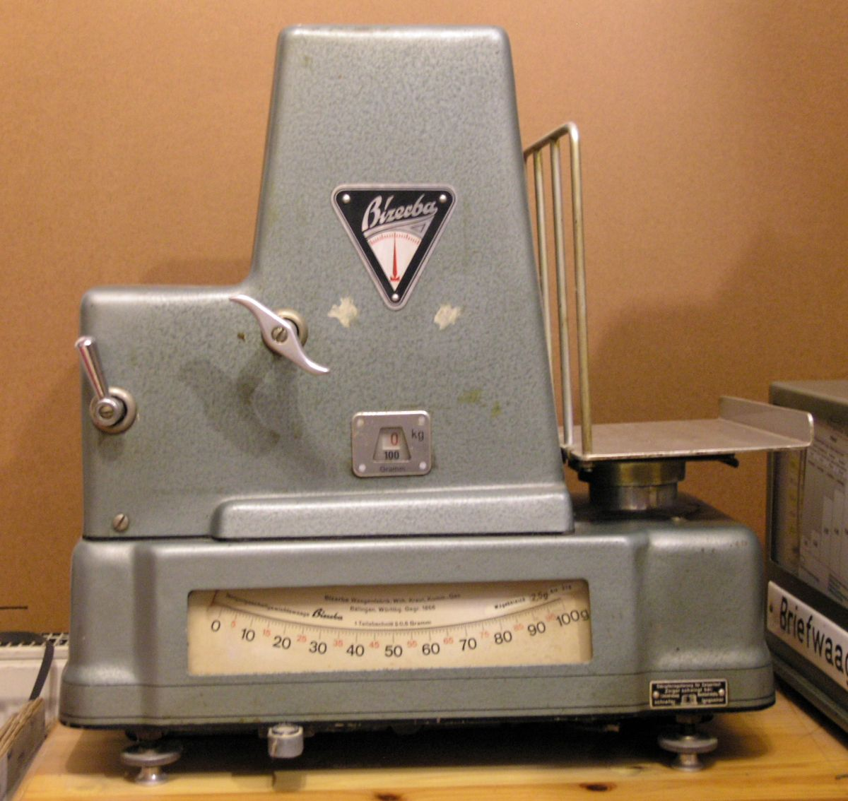 Neigungsschaltgewichtswaage/ Neigungswaage mit zusätzlichem Schaltgewicht, bis 2kg, Deutsche Bundespost